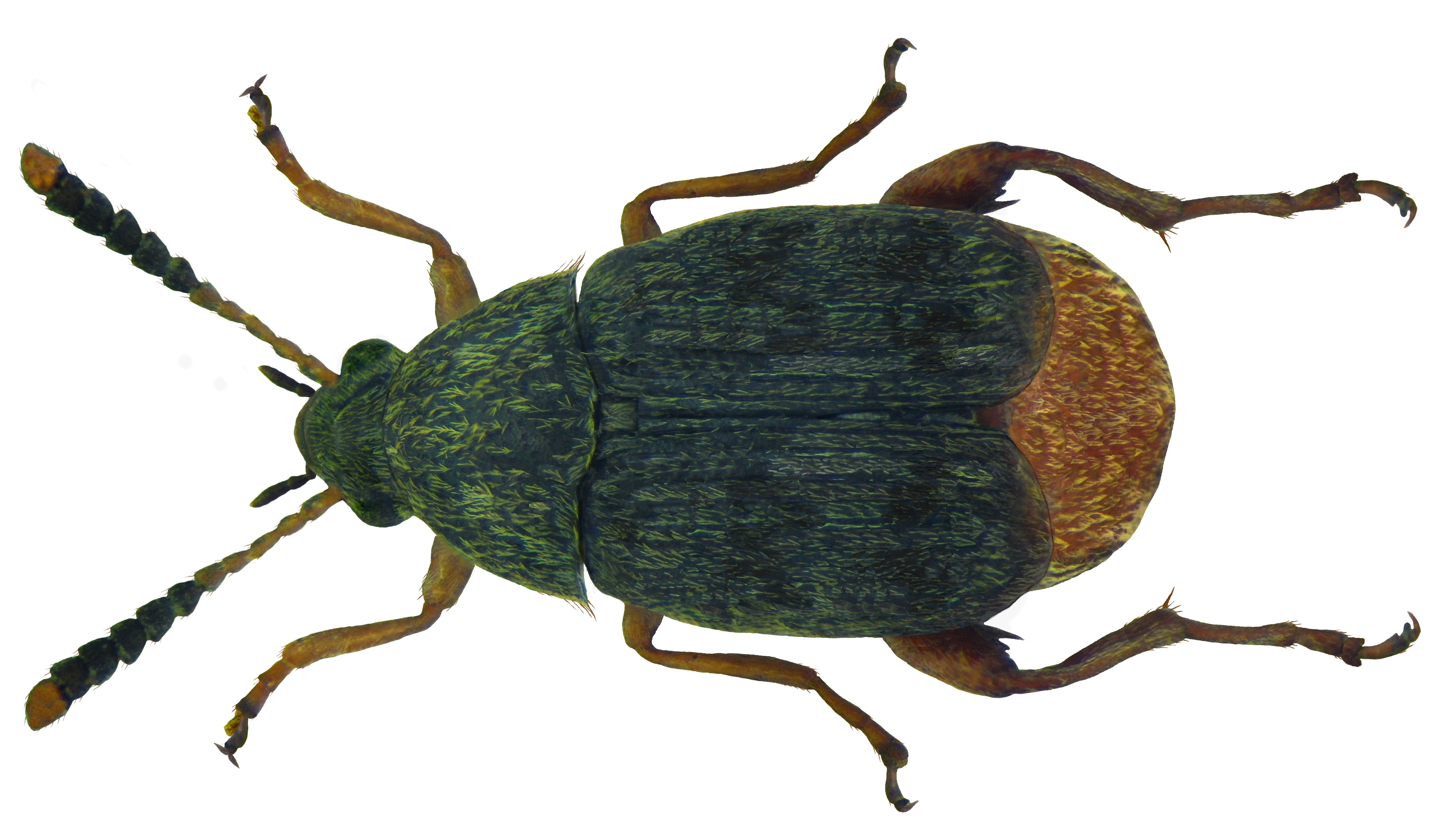 Familie: Bruchidae (Chrysomelidae) Groesse: 2,7-4,2 mm Verbreitung: Kosmopolit, in MItteleuropa eingebürgert Oekologie: Vorratsschädling, im Freiland an Bohnen (Phaseolus vulgaris) Fundort: England, leg. II.1947; Coll. Museum Oxford Photo: U.Schmidt, 2011